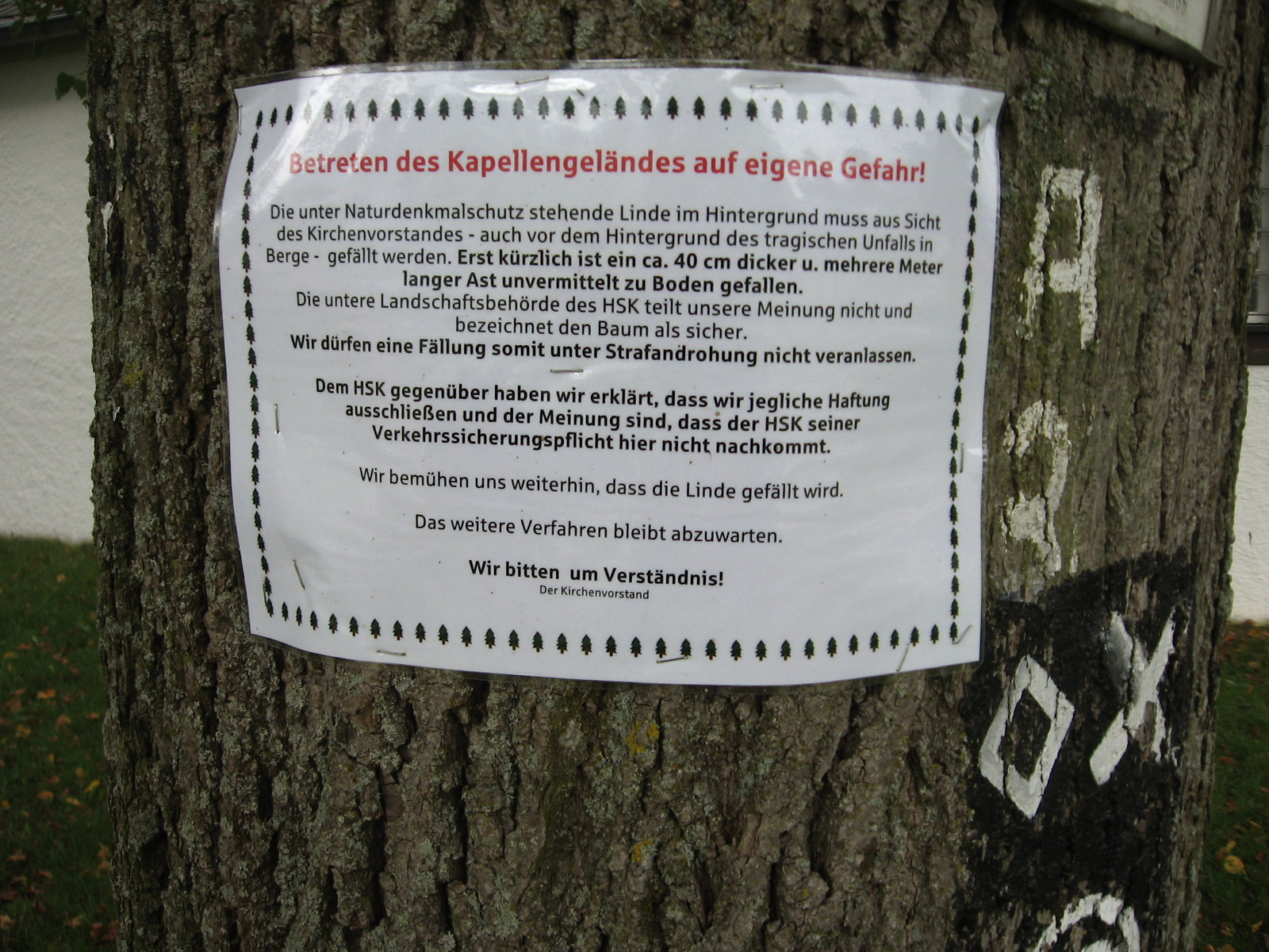 Hinweis des Kirchenvorstands von St. Severinus Calle am Nebenbaum des Naturdenkmal Linde (Nr 2.2.24 im Landschaftsplan Meschede) neben der Halloh-Kapelle nördlich von Meschede-Wallen.